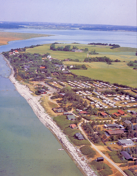 Svinø Strand set fra luften (Halvøen set fra luften - mens der stadig var camping)